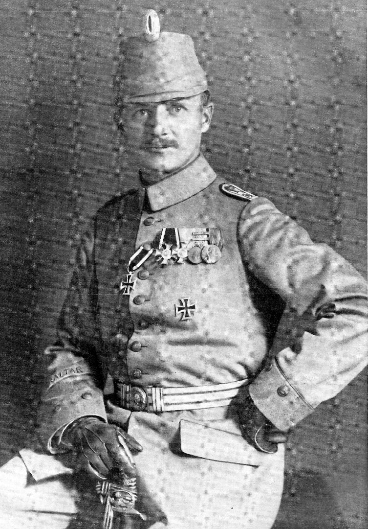 Major Krahmer-Möllenberg, nach ihm wurde die Goslarer Kaserne benannt